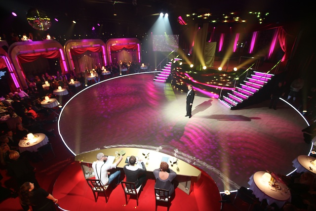 Tantsud tähtedega